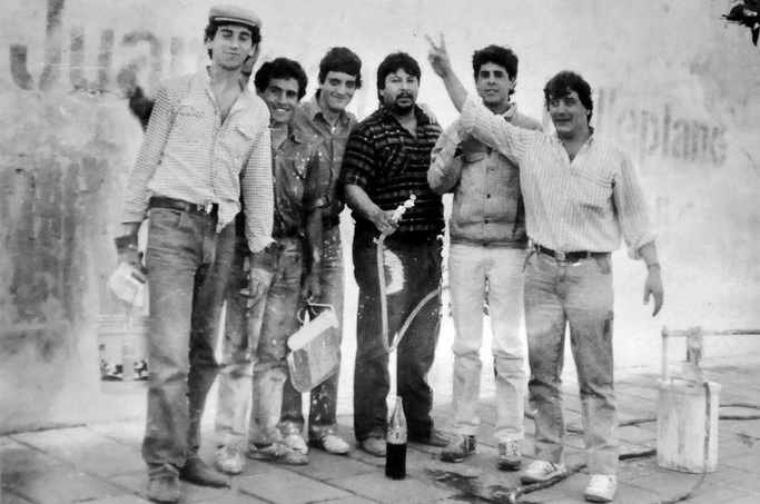 Florencio Randazzo (primero desde la izquierda) y un grupo de militantes de la Juventud Peronista pintan una pared en Chivilcoy, circa 1982.